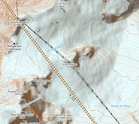 carte réalisée sur umap This map may be incomplete, and may contain errors. Don't rely solely on it for navigation.